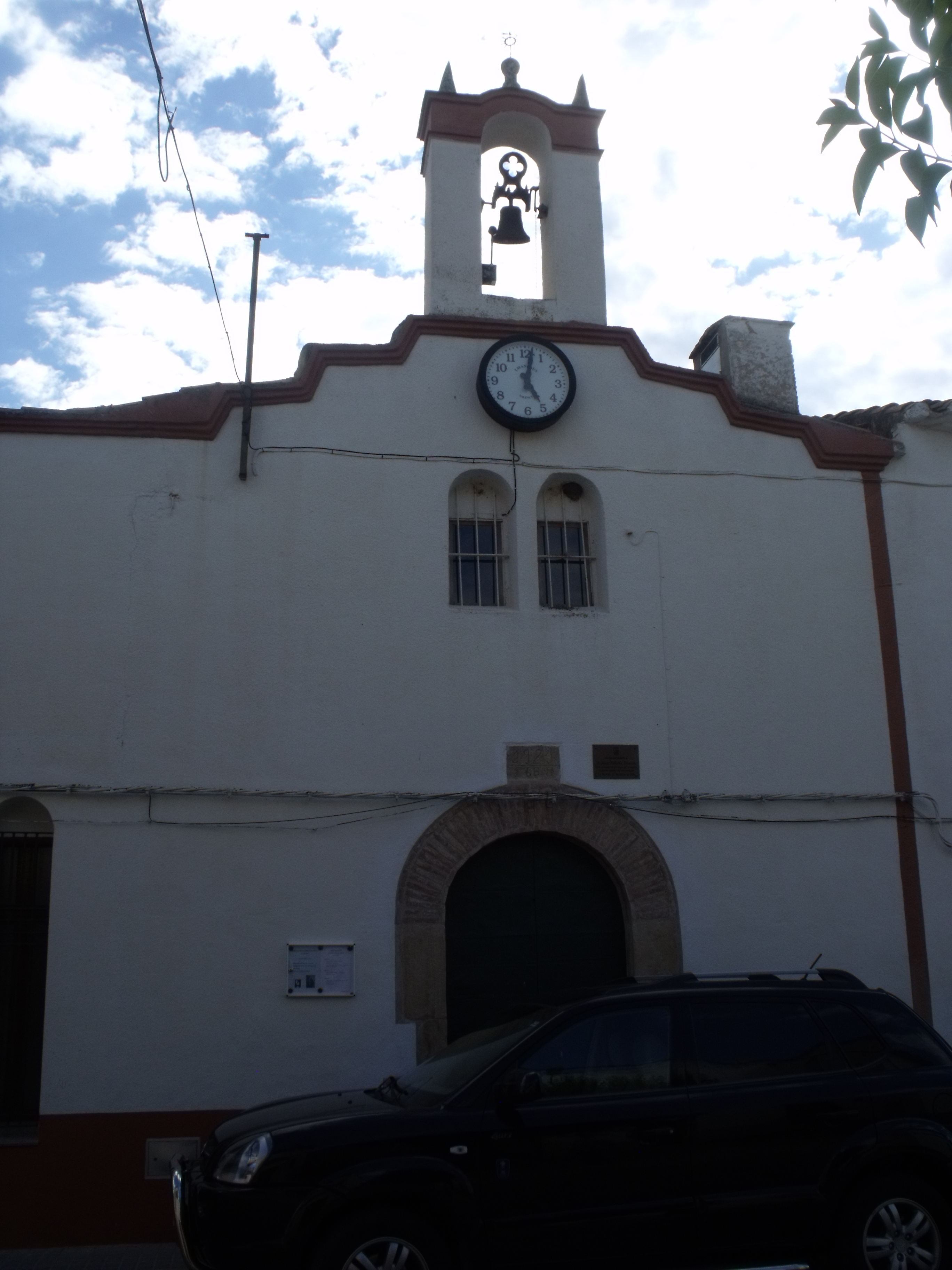 detalle de la espadaña